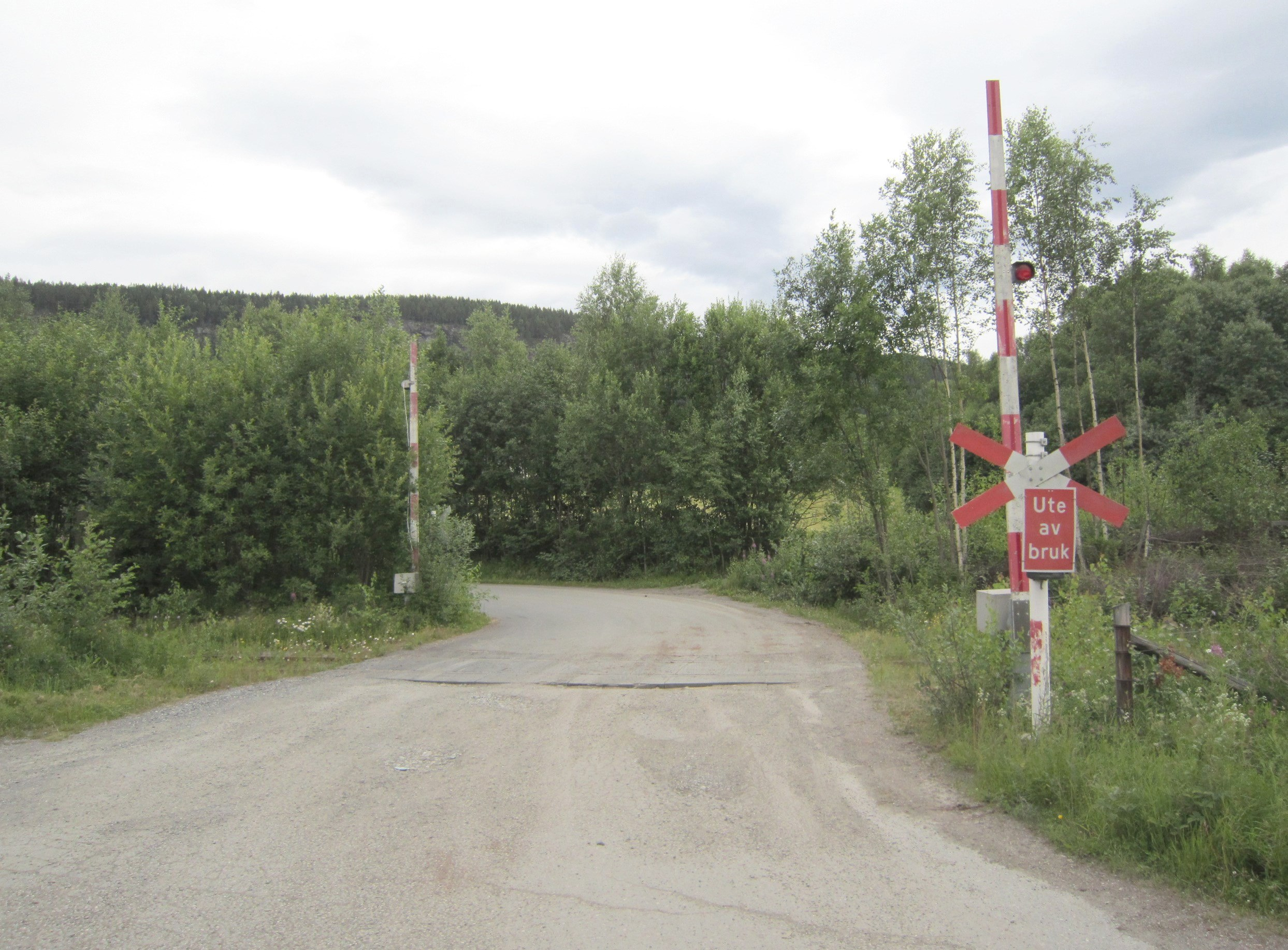 Planovergang på Odnes i Søndre Land. Ikke langt unna lå en gang en stasjon (brant 2001), og Land sag er like ved.